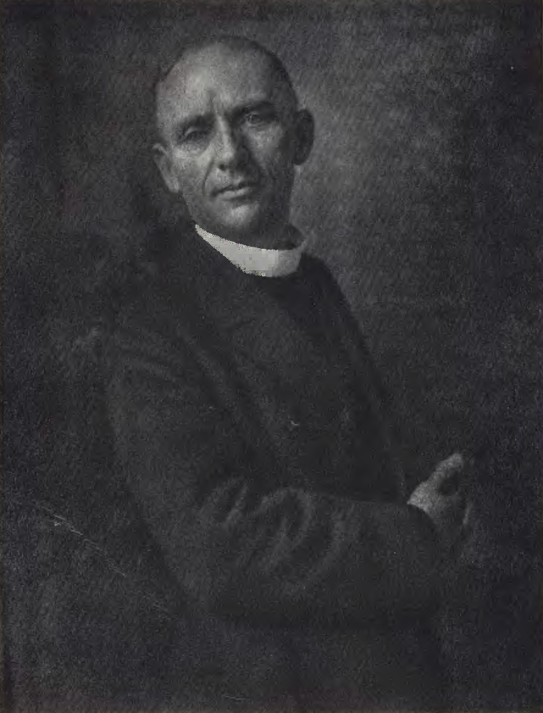 Prof. Neumann aus Neisse (Oberschlesien) fotografiert durch Max Glauer.